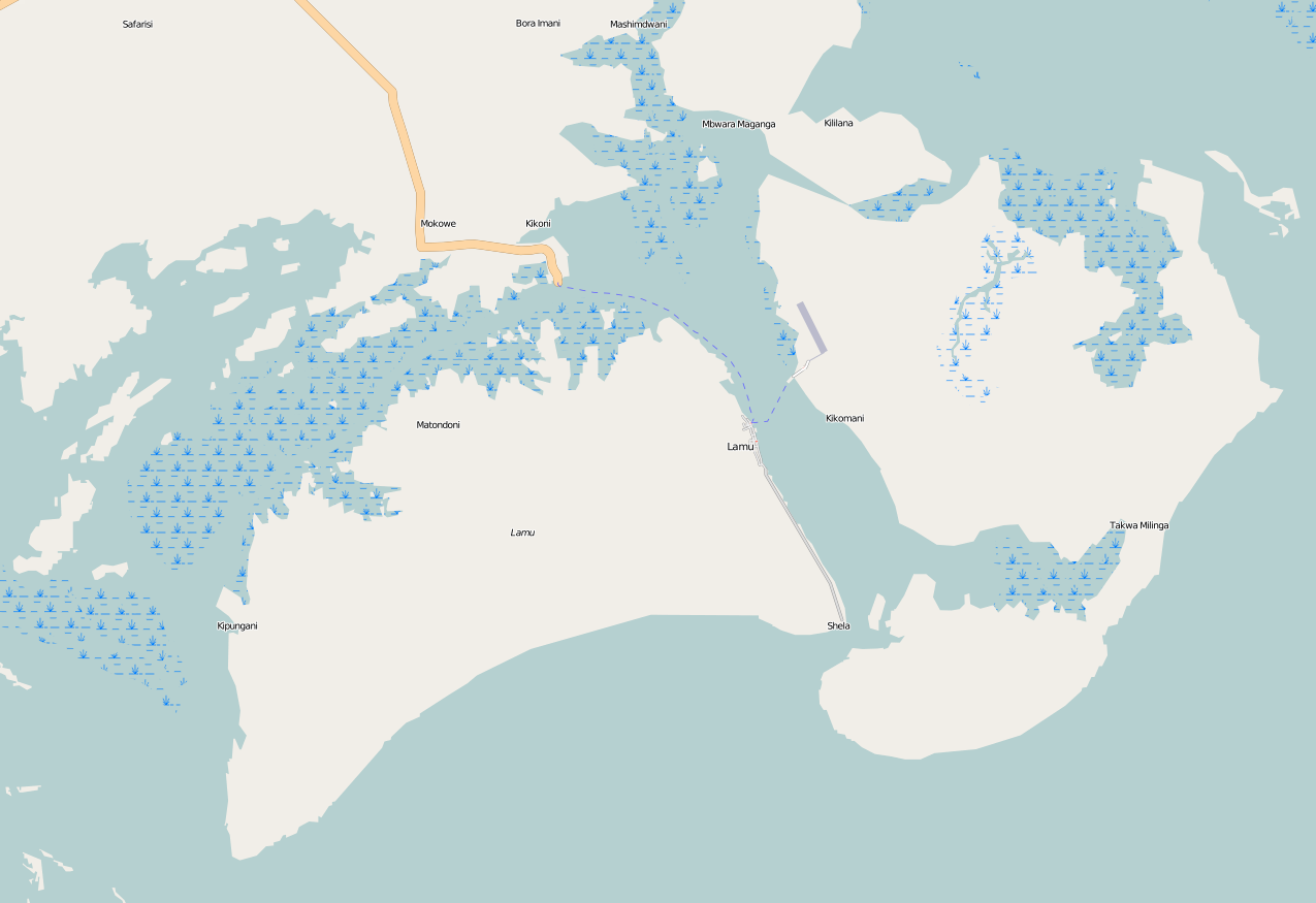 îles de Lamu et de Manda dans l'archipel de Lamu